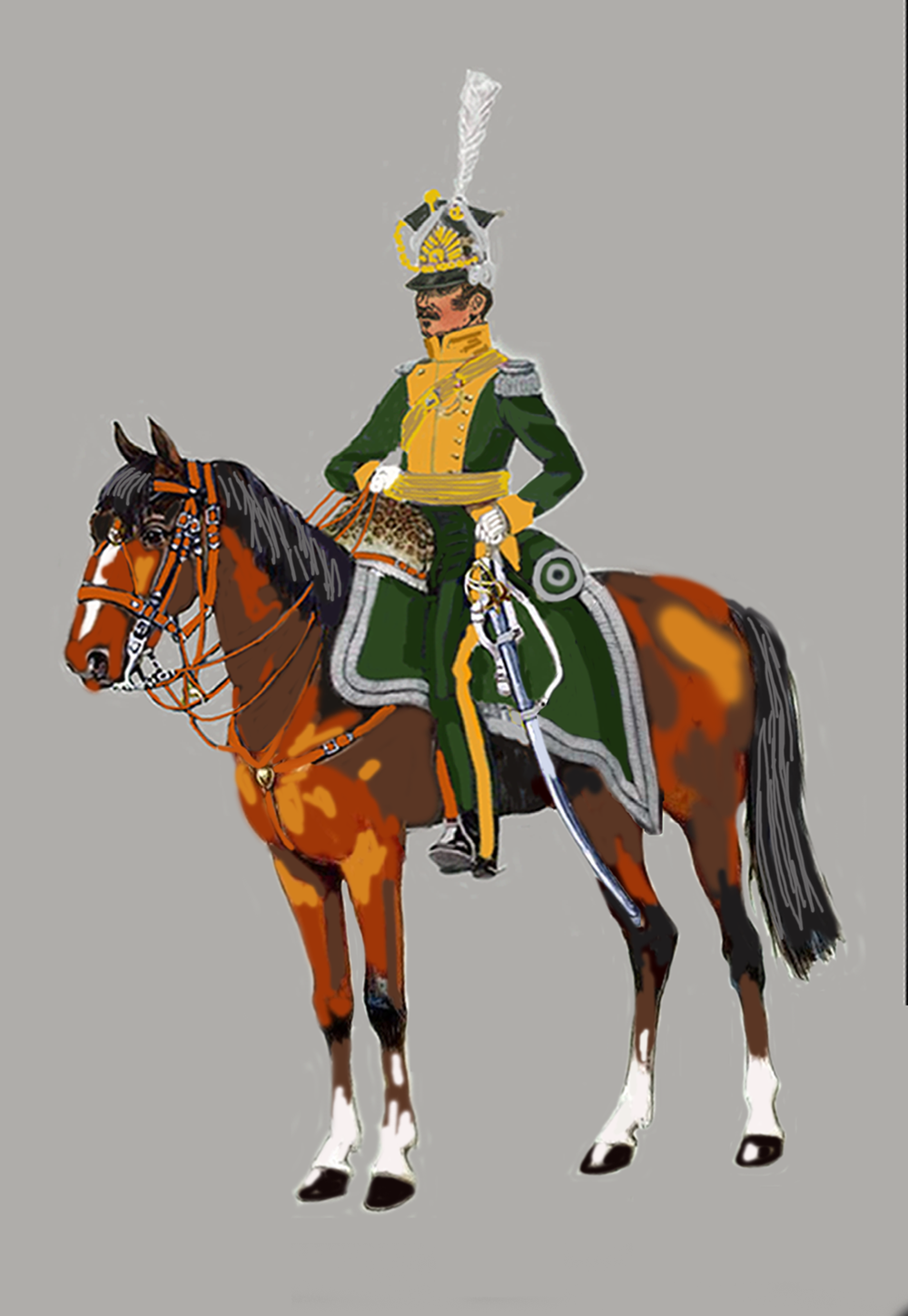 Chevau-légers lanciers du 8e régiment.